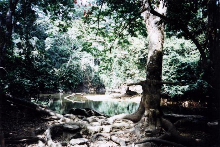 Osun river in Osogbo - Osun state - Nigeria - Africa